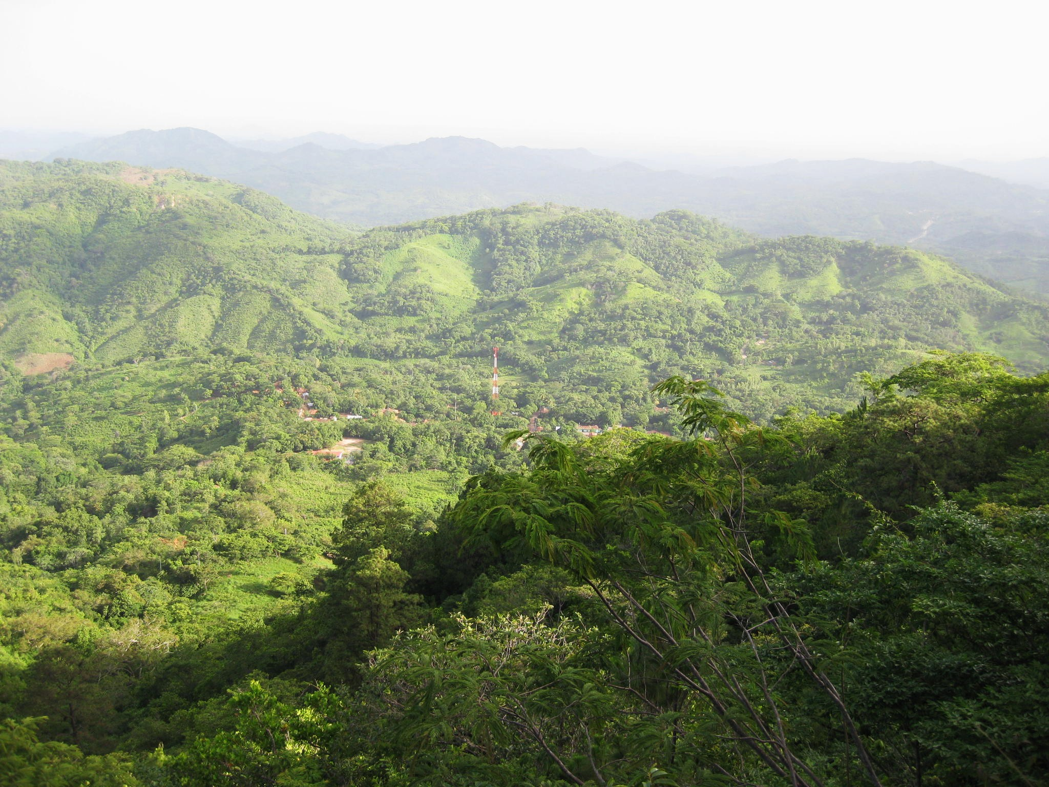 Una vista mas del Pueblo de San Juan de Cinco Pinos